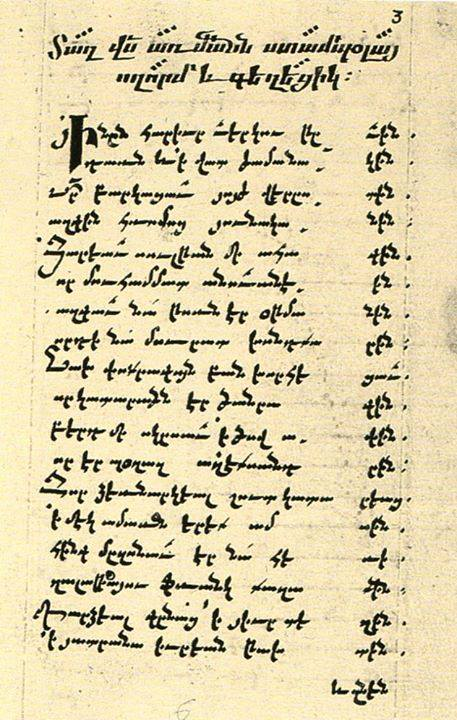 Абраам Анкюраци, «Плач на взятие Константинополя» Matenadaran, рук. No 10721, 6-й лист